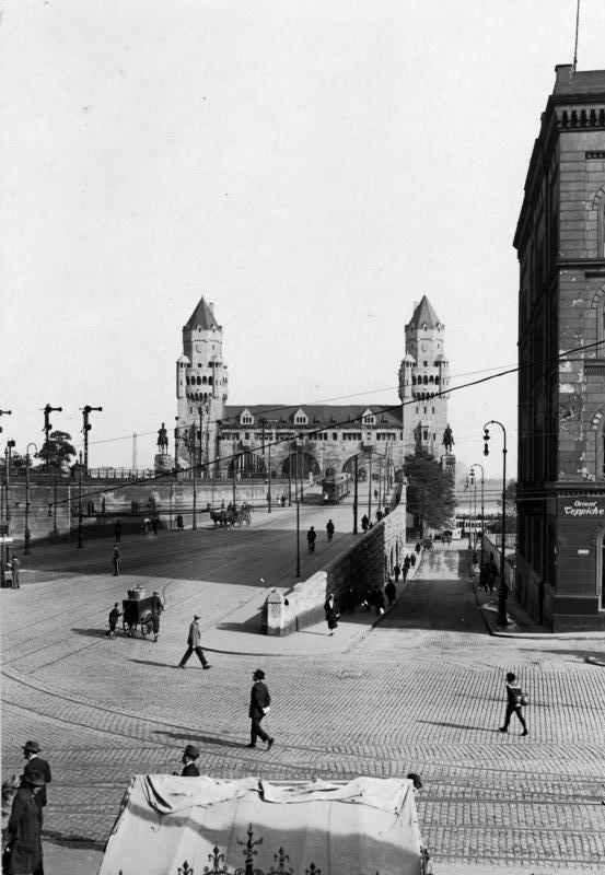 Köln.- Hohenzollernbrücke vom Dom gesehen